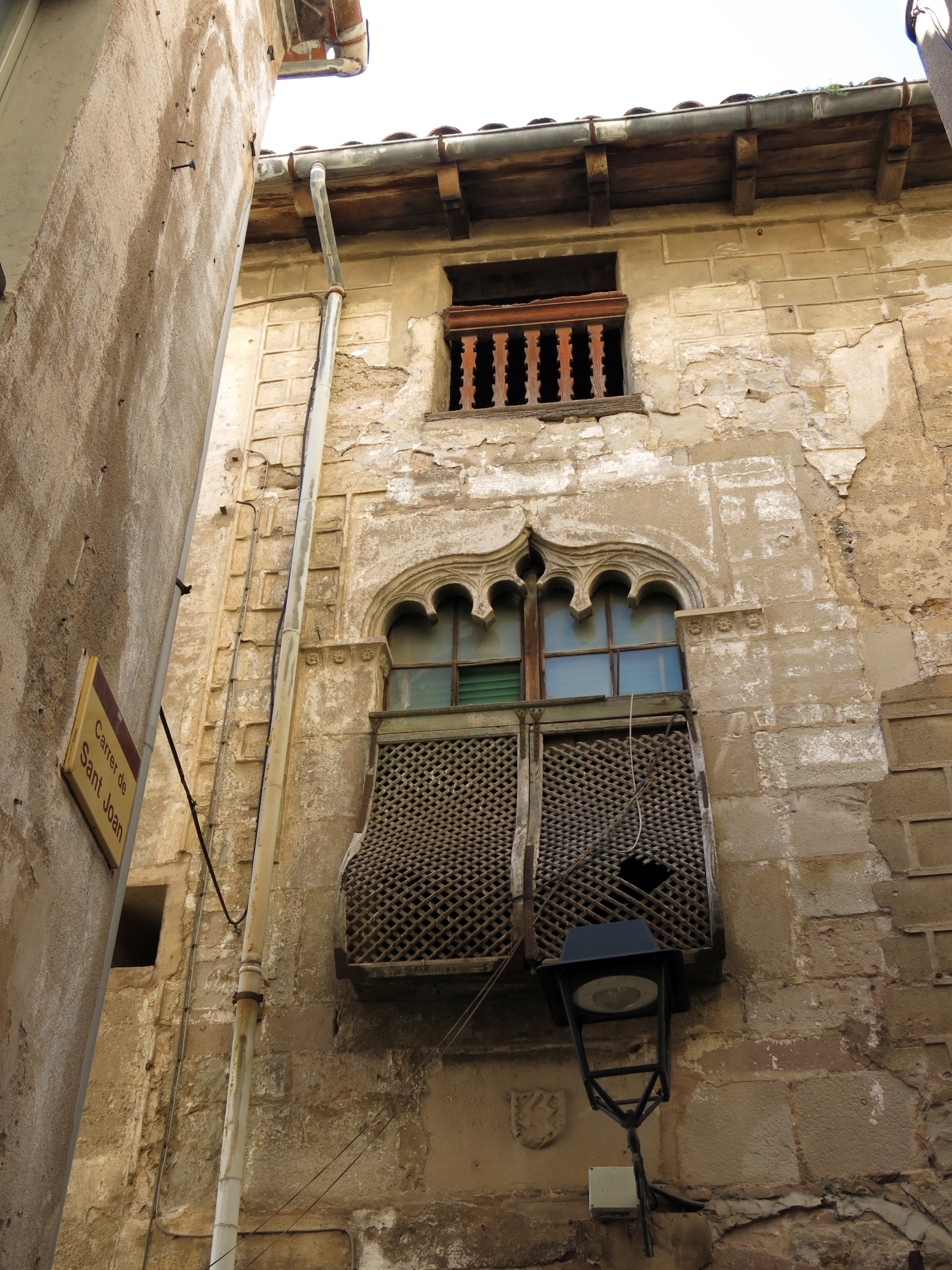 Can Cavaller (Monistrol de Montserrat))